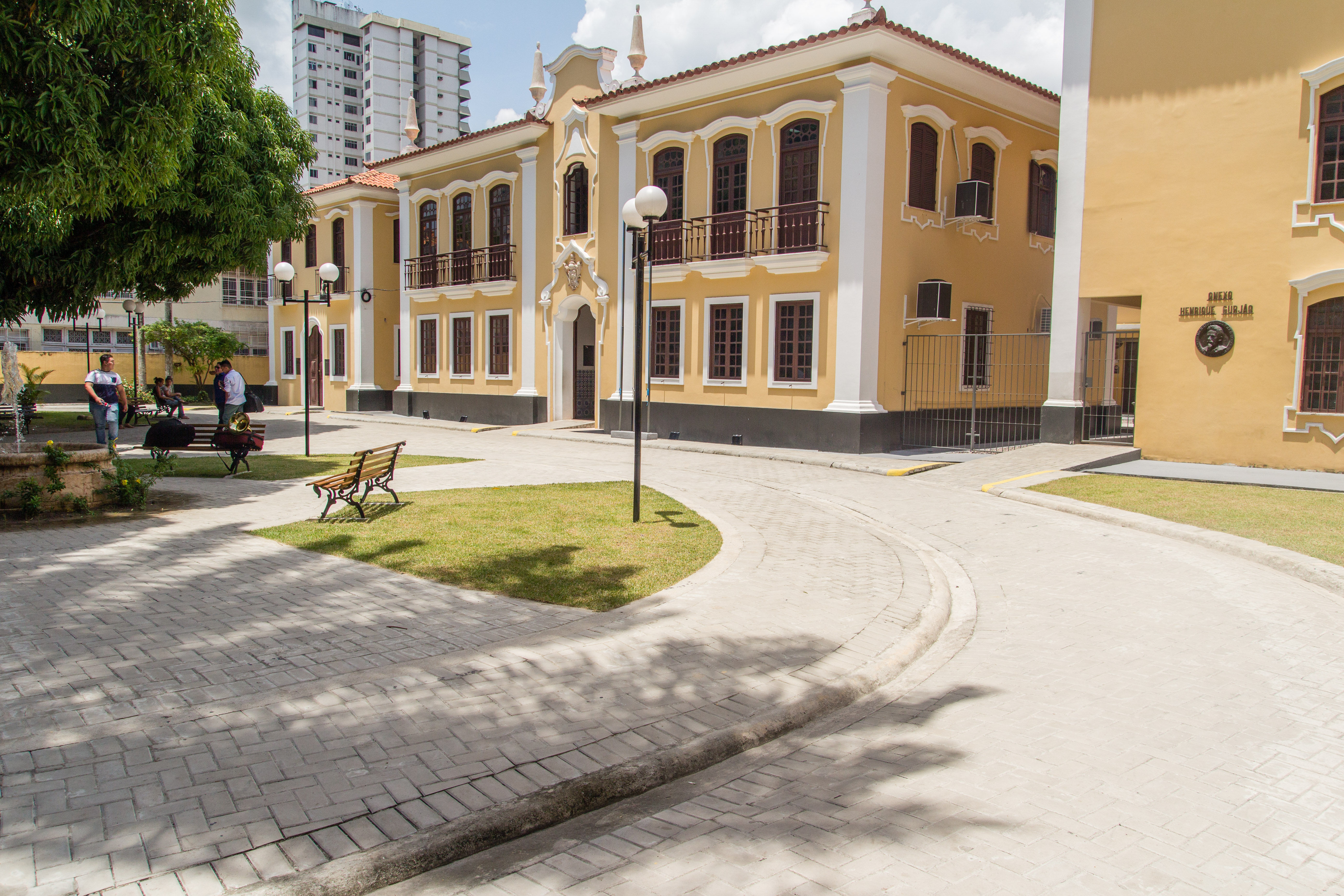 Imóvel do Instituto Estadual Carlos Gomes em Belém, Pará